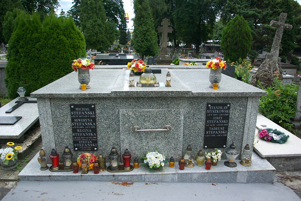 Grób Stefańskich w Sanoku